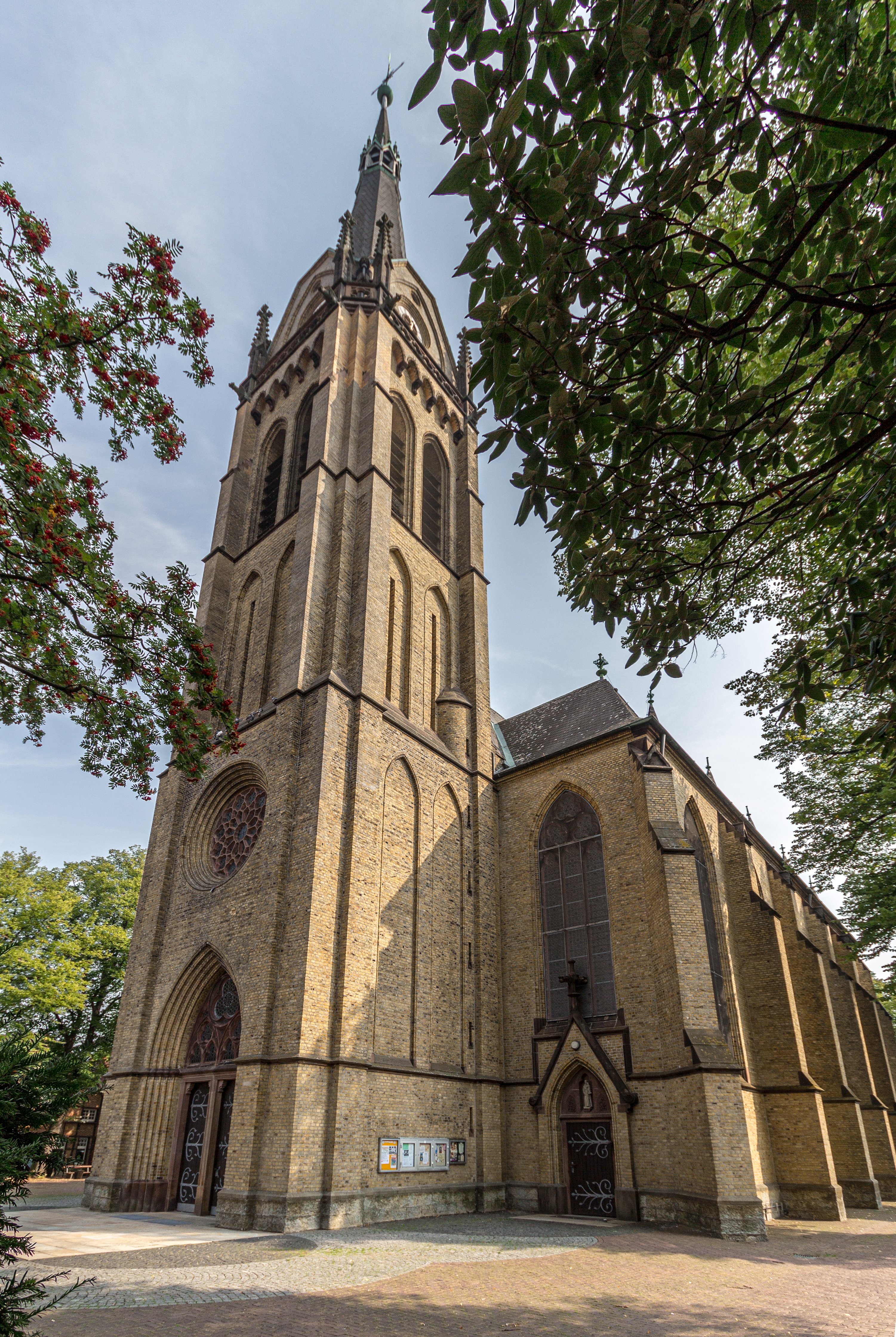 St.-Dionysius-Kirche in Seppenrade, Lüdinghausen This image shows a heritage building in Germany, located in the North Rhine-Westphalian city Lüdinghausen (no. A/001).